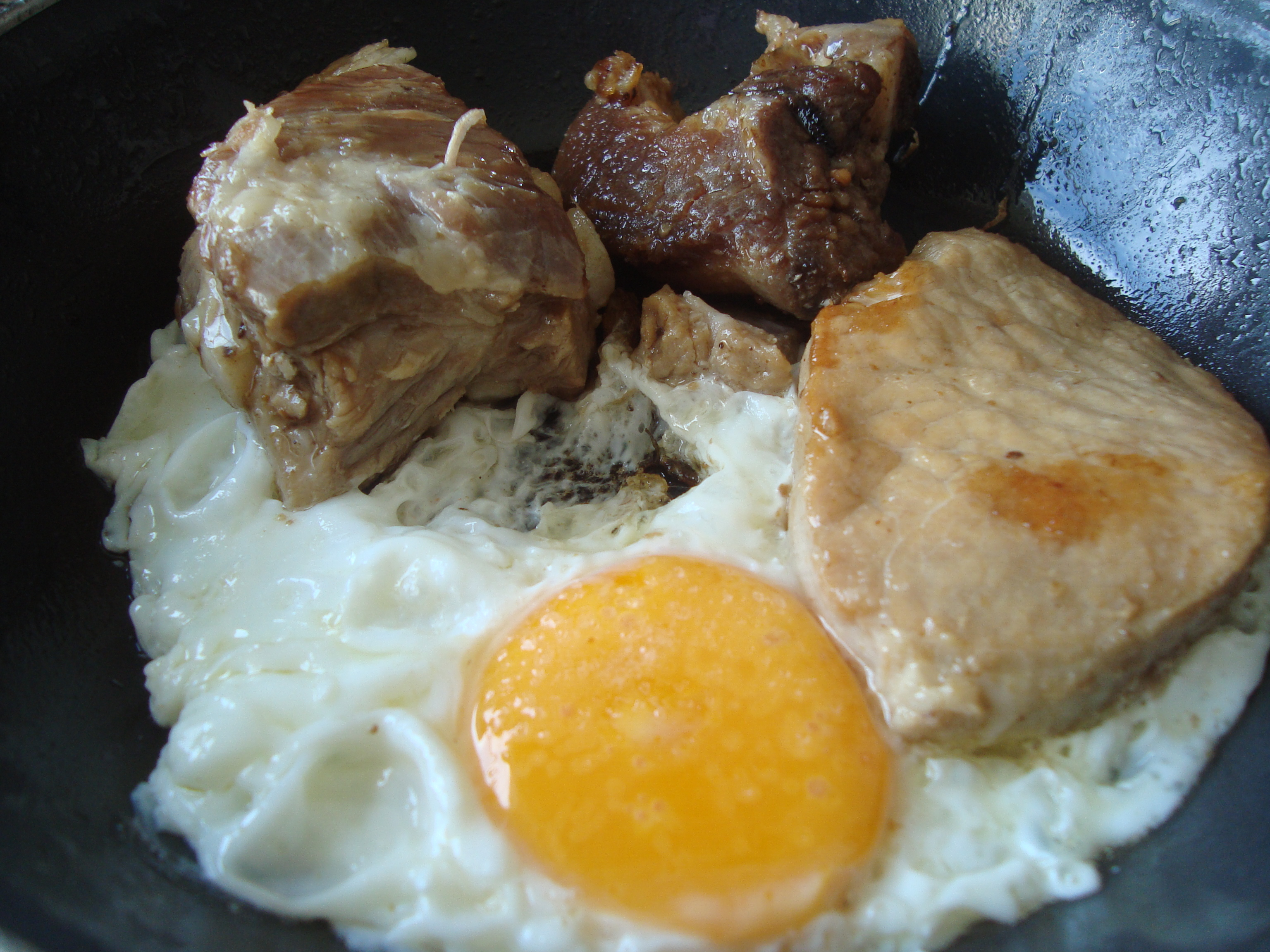 Conserva de cerdo en "Frito". Conserva del Perol con huevo frito.